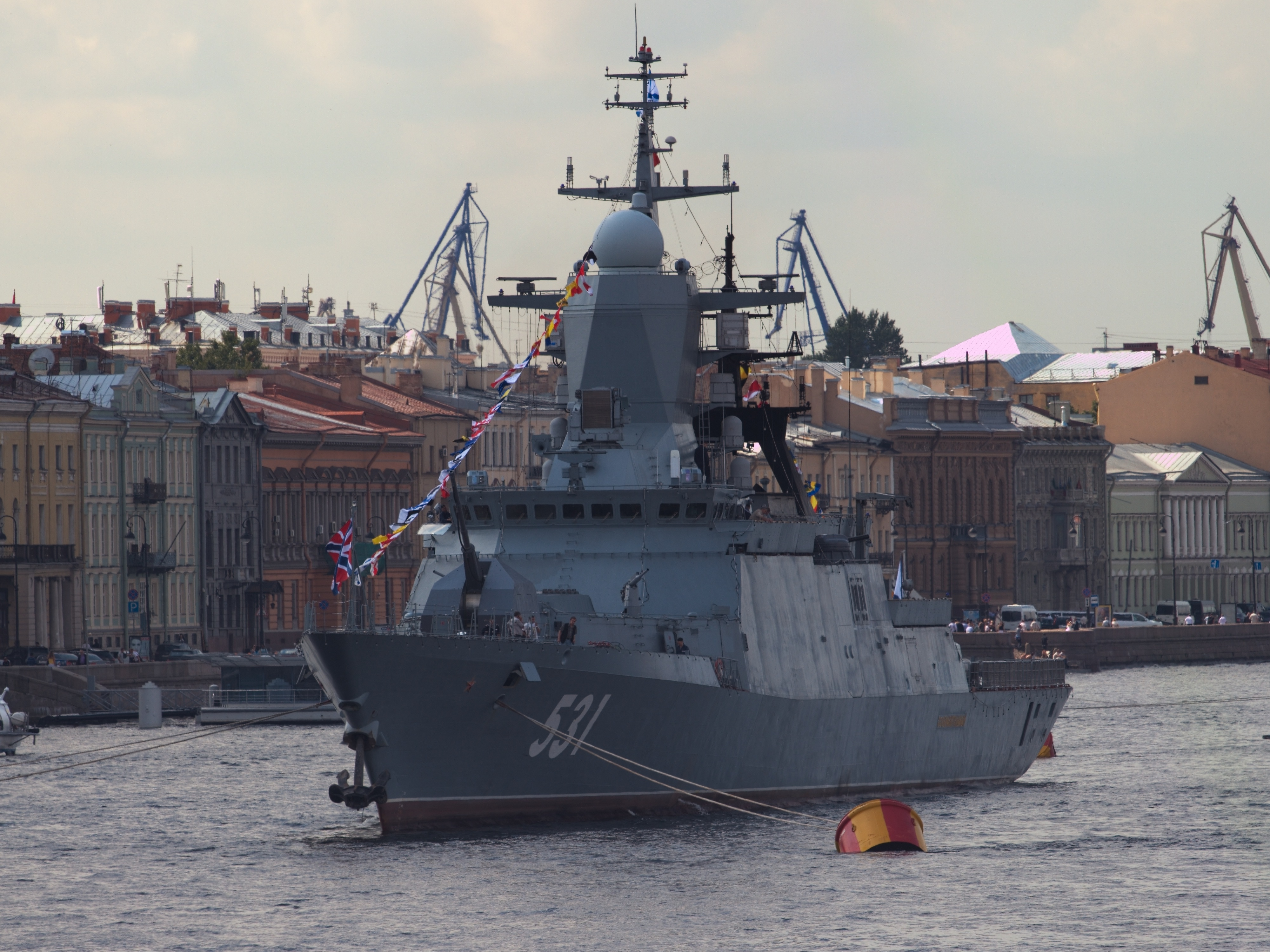 Корвет "Сообразительный" проекта 20380.